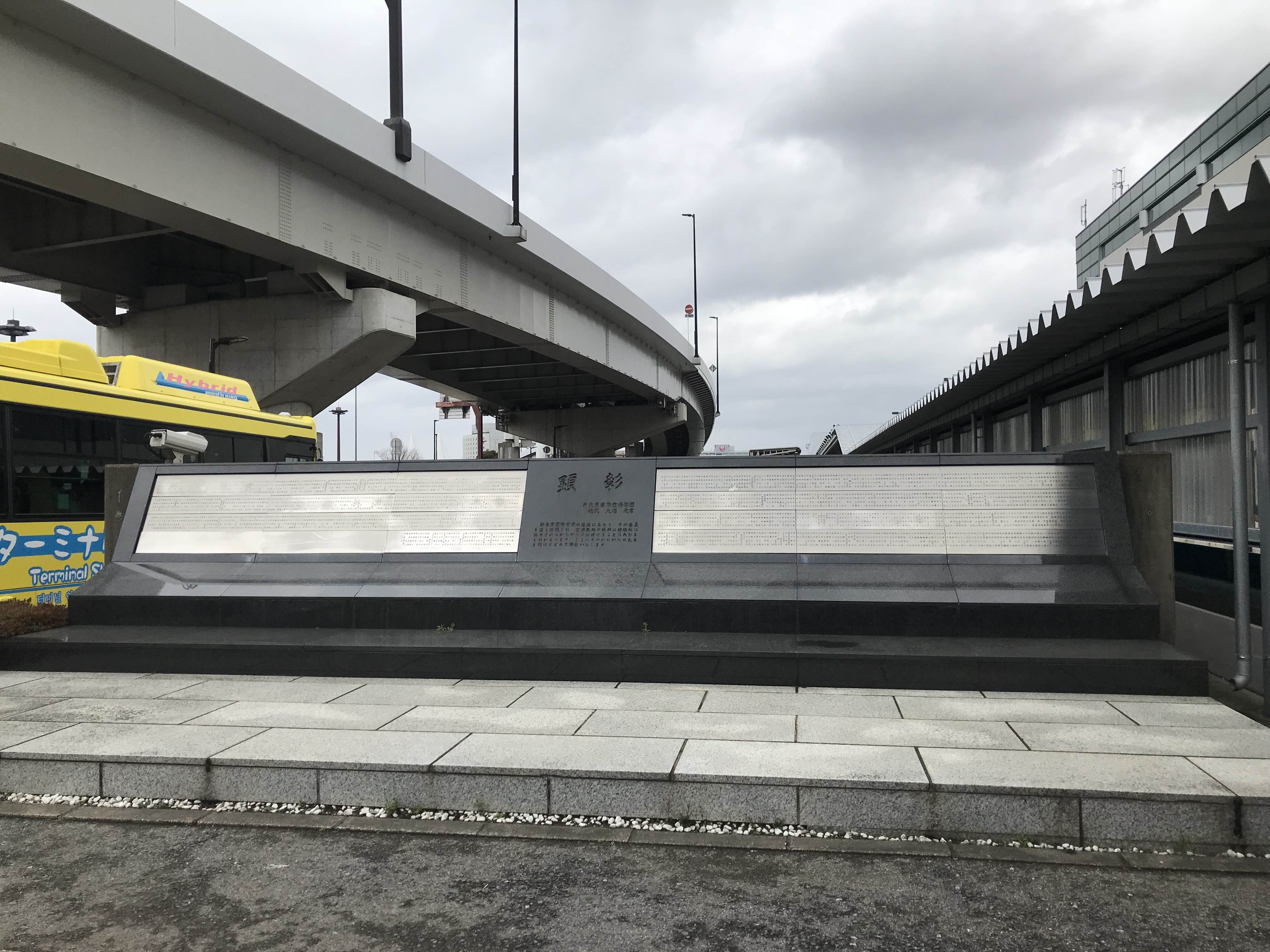 成田国際空港（旧・新東京国際空港）建設用地提供者の顕彰碑